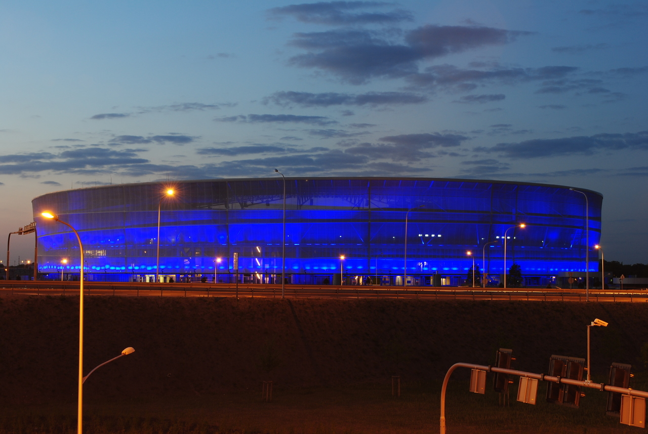 Stadion Miejski we Wroclawiu - testy iluminacj